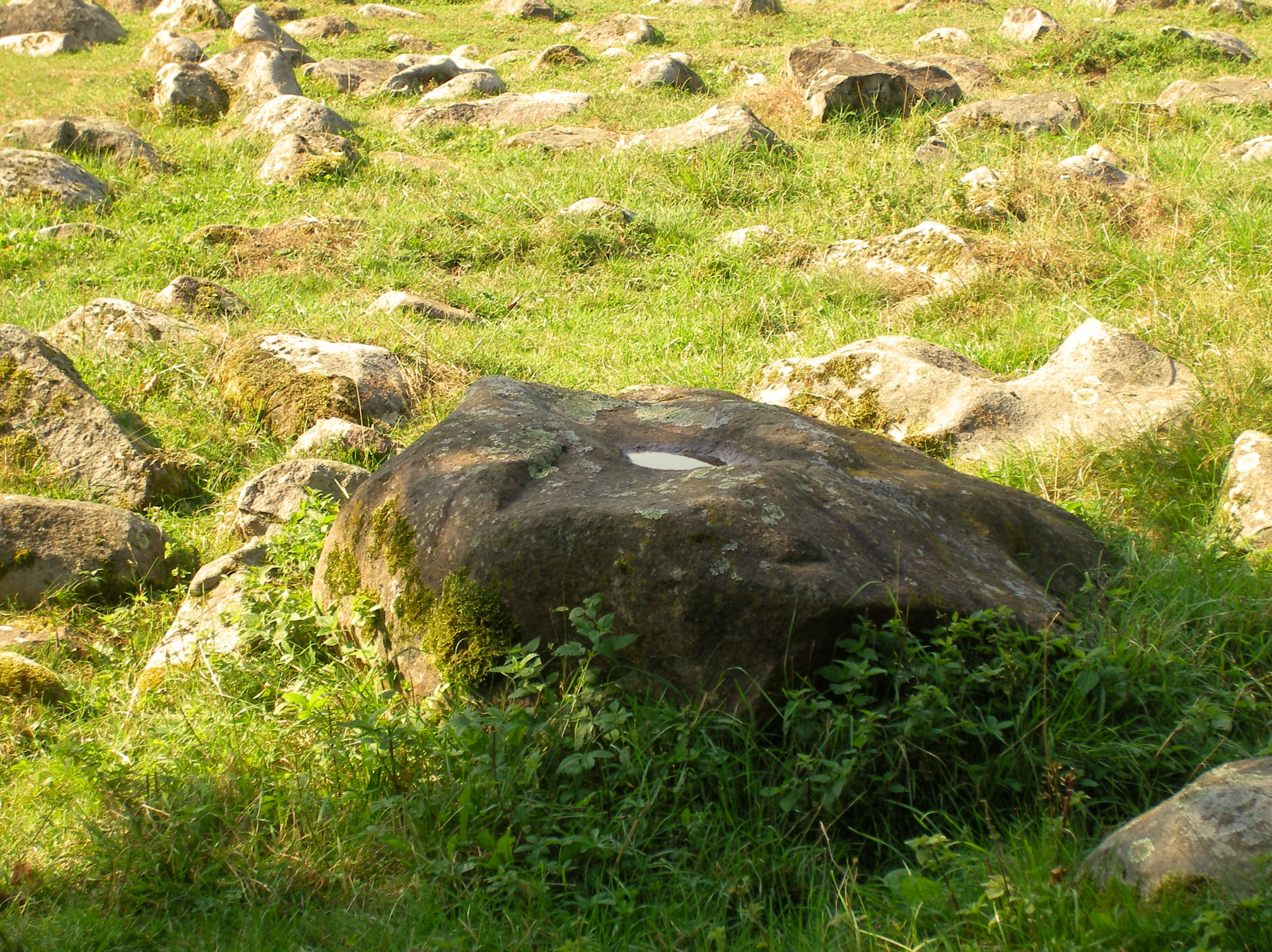 Am nordöstlichen Rand des kleinen Ortes Fichtenhof (Markt Königstein, Landkreis Amberg-Sulzbach) befindet sich auf einer als Viehweide genutzten Fläche ein Blockfeld mit mehreren Dutzend Kallmünzern.